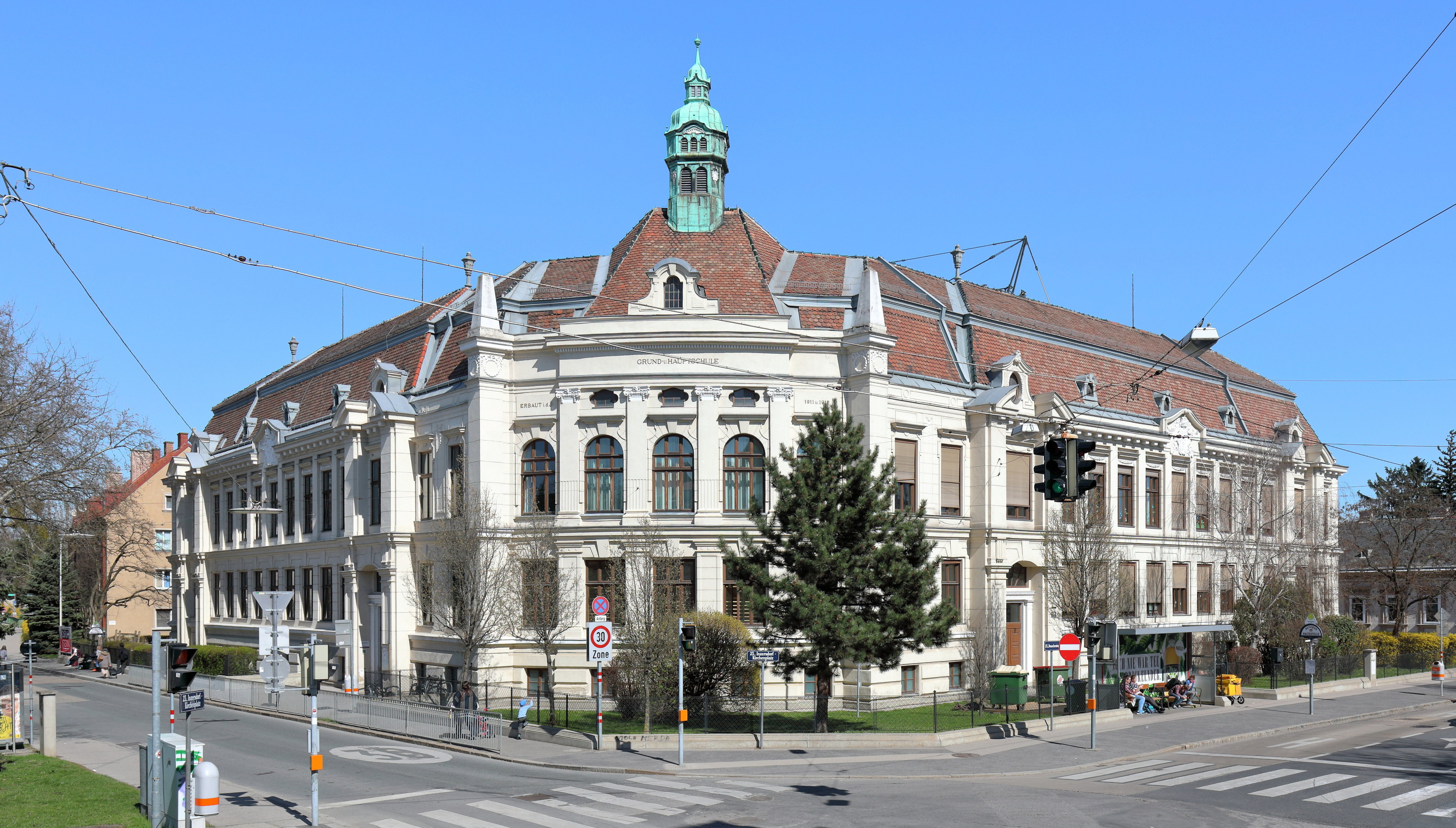 Südwestansicht des Schulgebäudes mit Adresse Draschestraße 96 in Inzersdorf, ein Bezirksteil des 23. Wiener Bezirkes Liesing. Das spätsecessionistisch-neoklassizistische Schulgebäude wurde von 1911 bis 1912 errichtet.